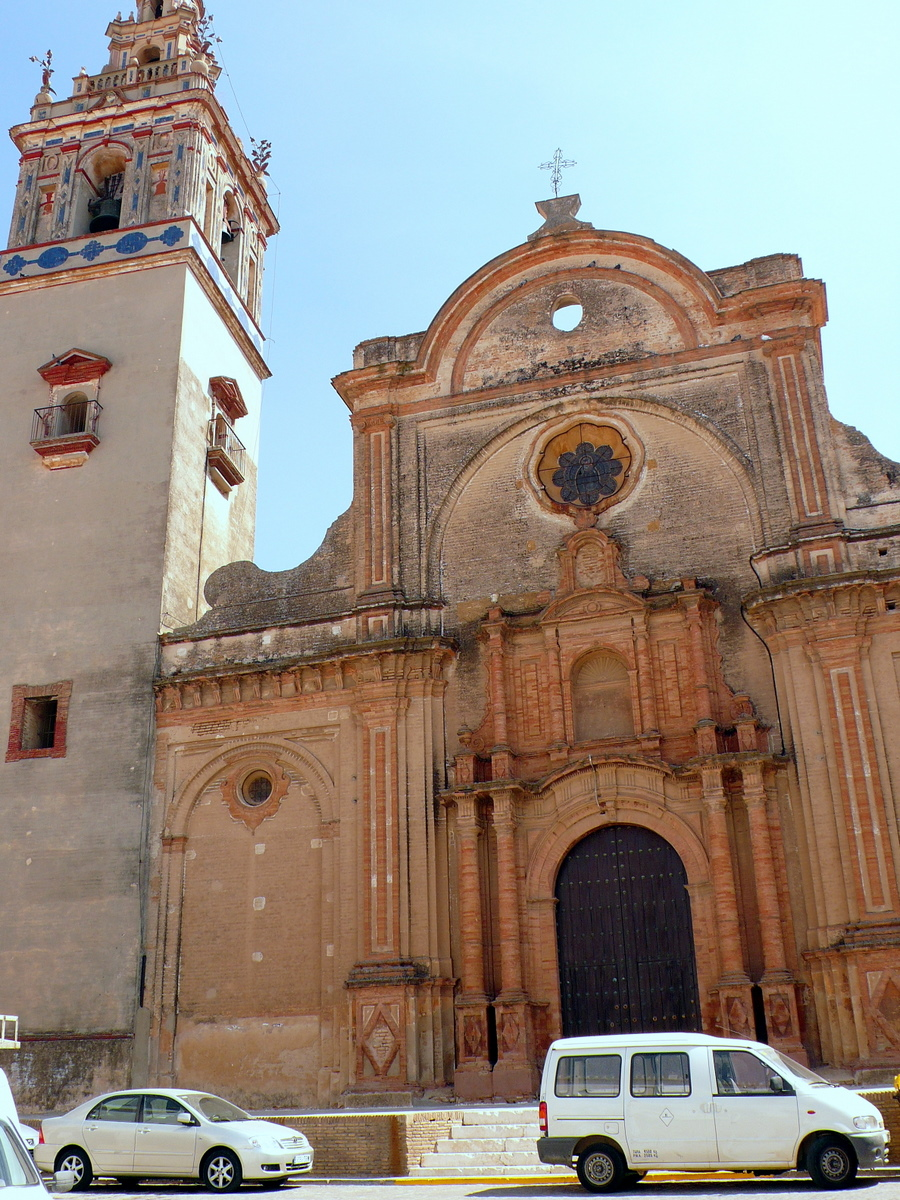 Vista exterior de la Iglesia Ntra. Sra. de la Granada (Moguer)